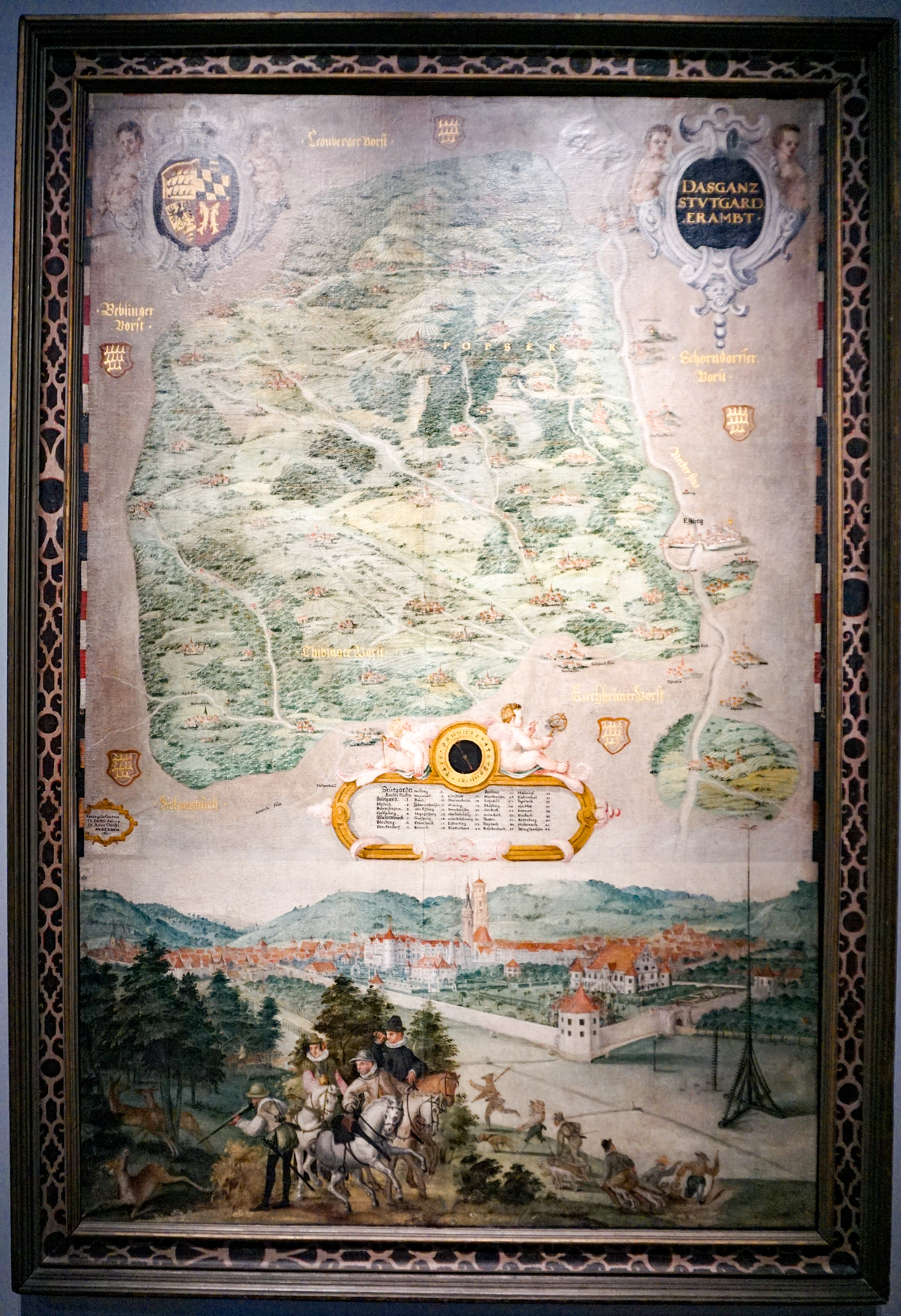 Stuttgarter Amt, aus einer Serie von zwölf Landtafeln im Festsaal des Neuen Lusthauses. Hans Steiner (um 1550 - 1610) und Georg Gadner (1522 - 1605), Stuttgart, 1589